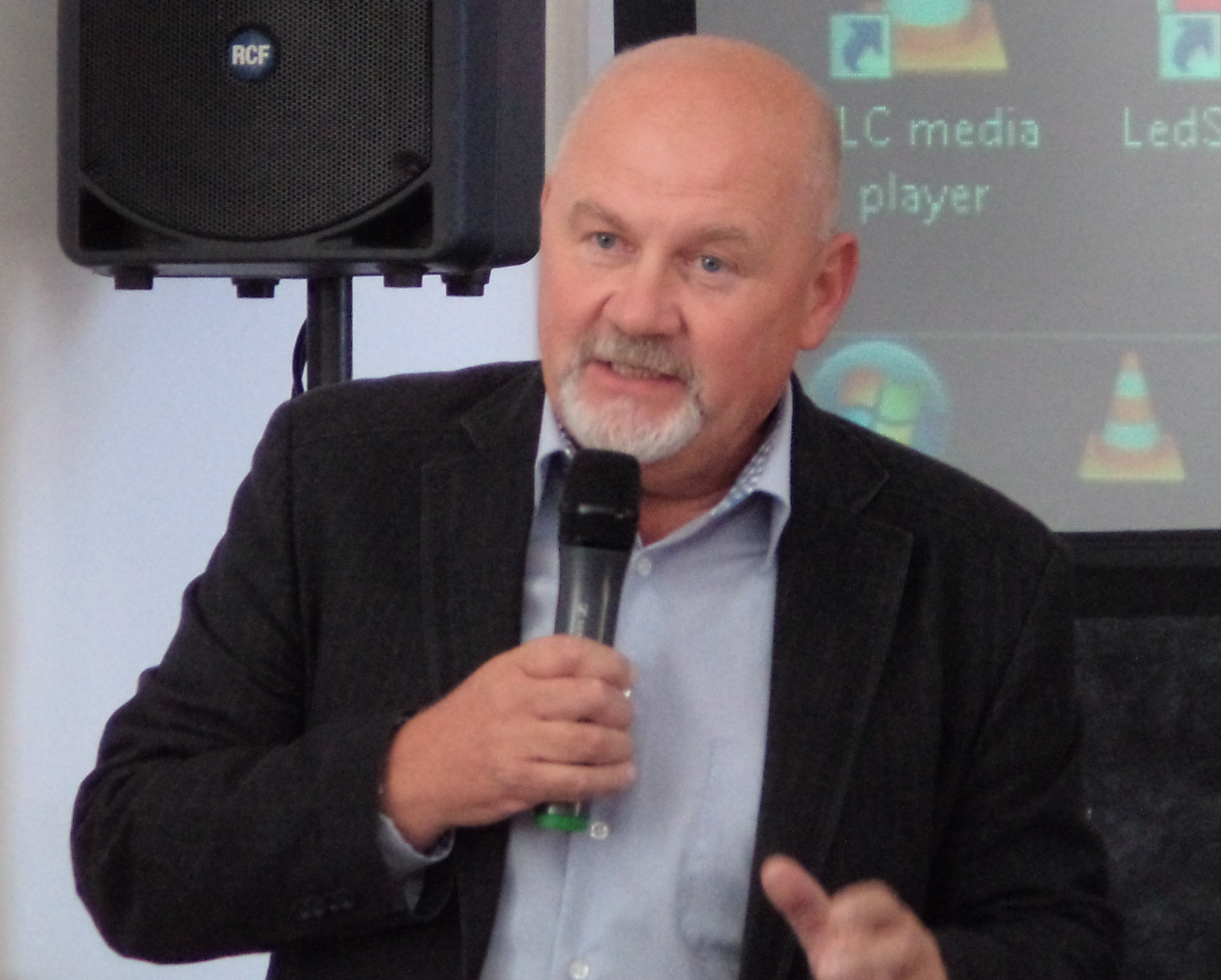 Luděk Galuška Pozsonyban